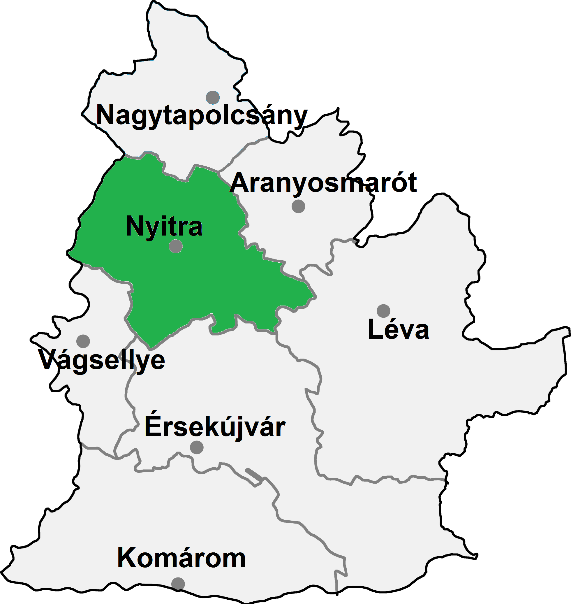 Nyitrai járás